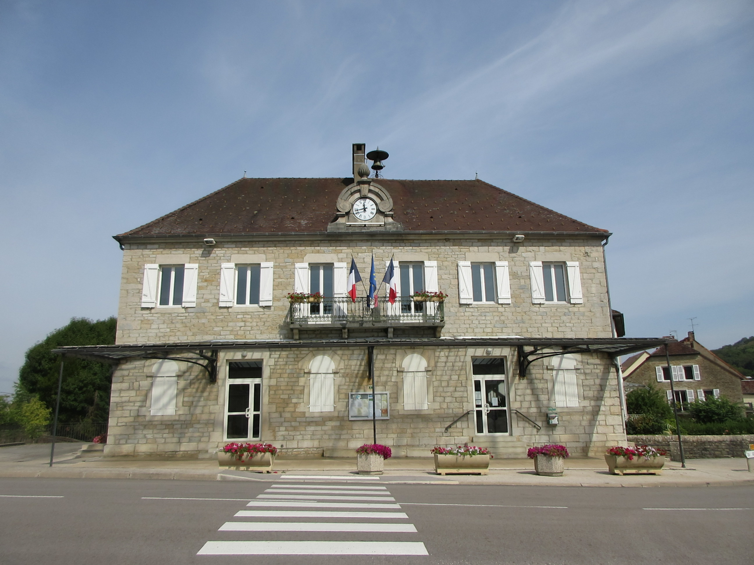 Mairie de Macornay.